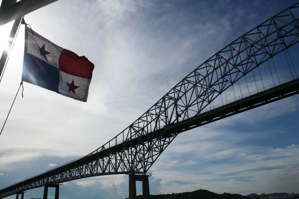 Panama